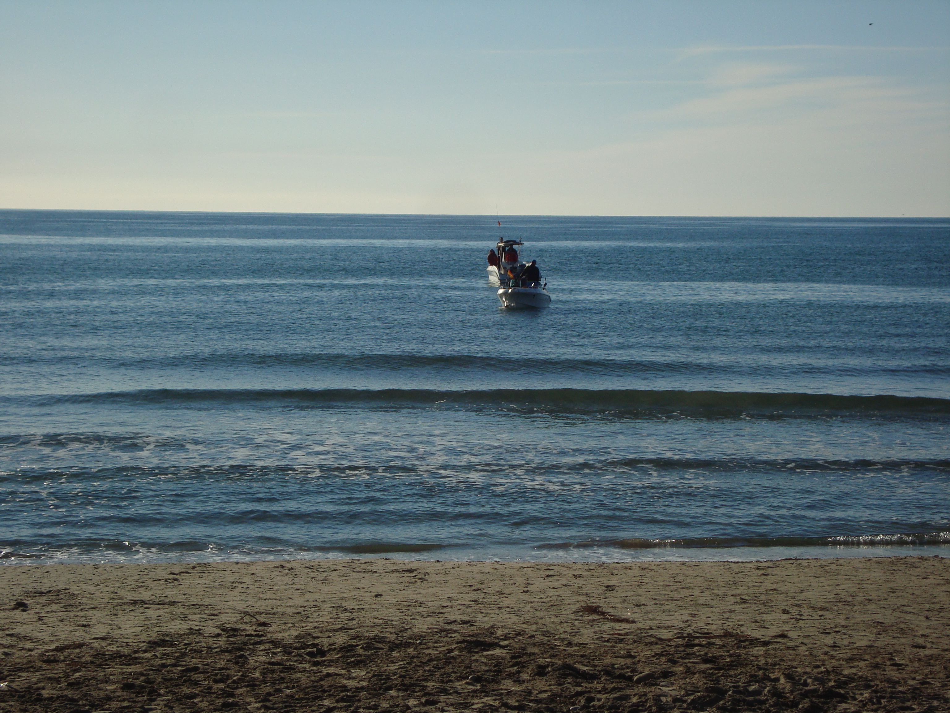 Platjes de Torrelasal, La Ribera de Cabanes